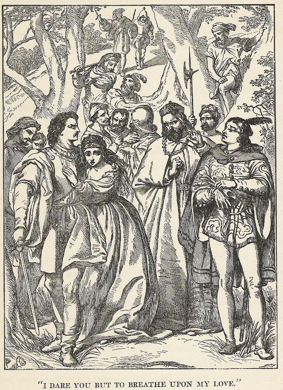 Illustration